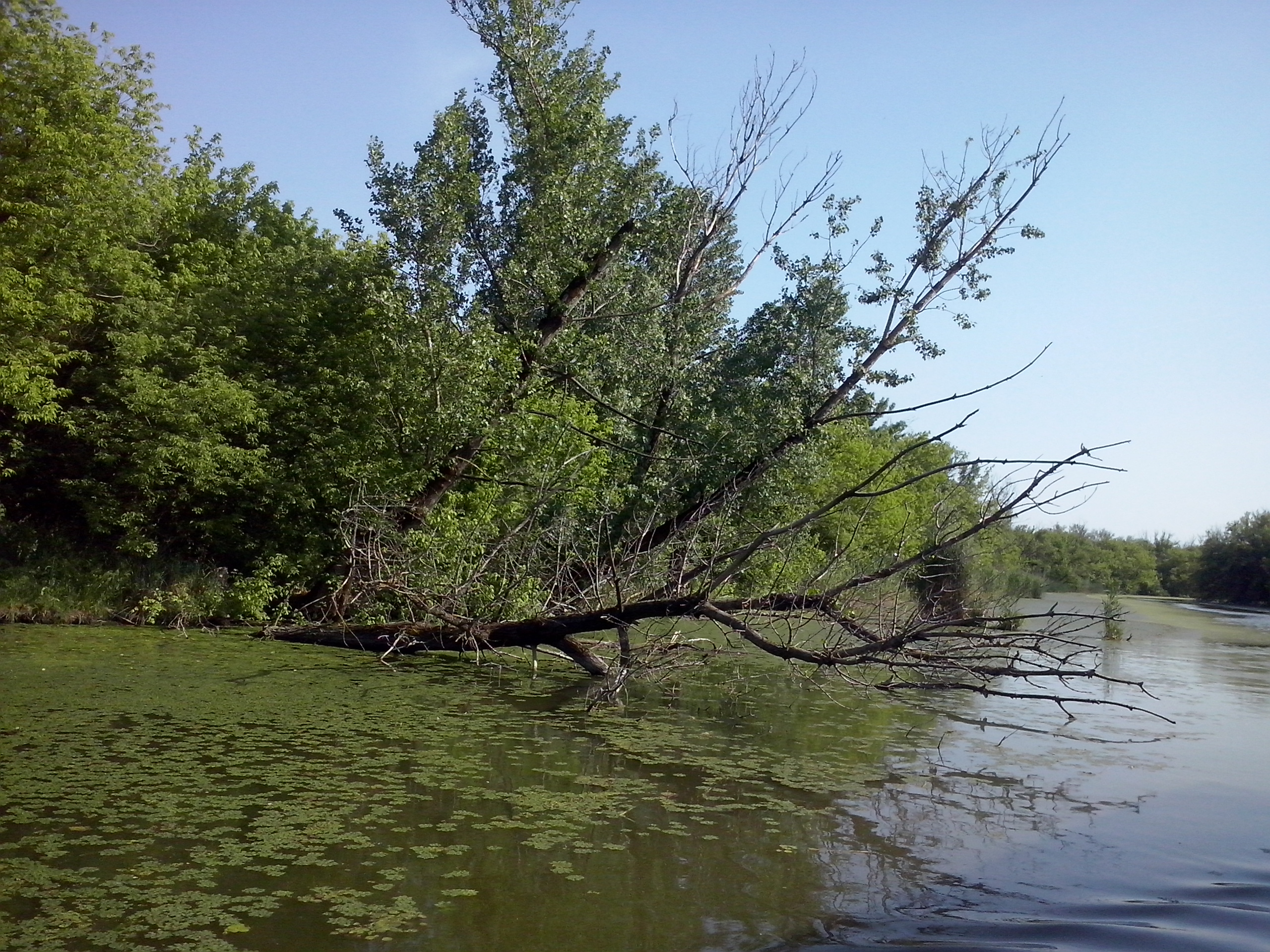 Ово је фотографија заштићеног природног добра у Србији под шифром: РП09This is a a photo of a natural area in Serbia with ID: РП09 Специјални резерват природе Царска бара